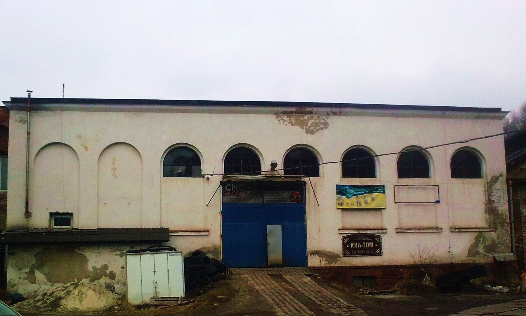 DZPJ w Nowej Rudzie. Budynek